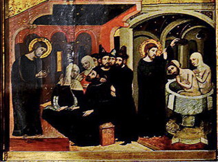 Retaule de Sant Marc i Sant Anià, obra d'Arnau Bassa (1346). Actualment a la Seu de Manresa. Taula de la conversió de Sant Anià i la seva família, al pis inferior del carrer esquerre